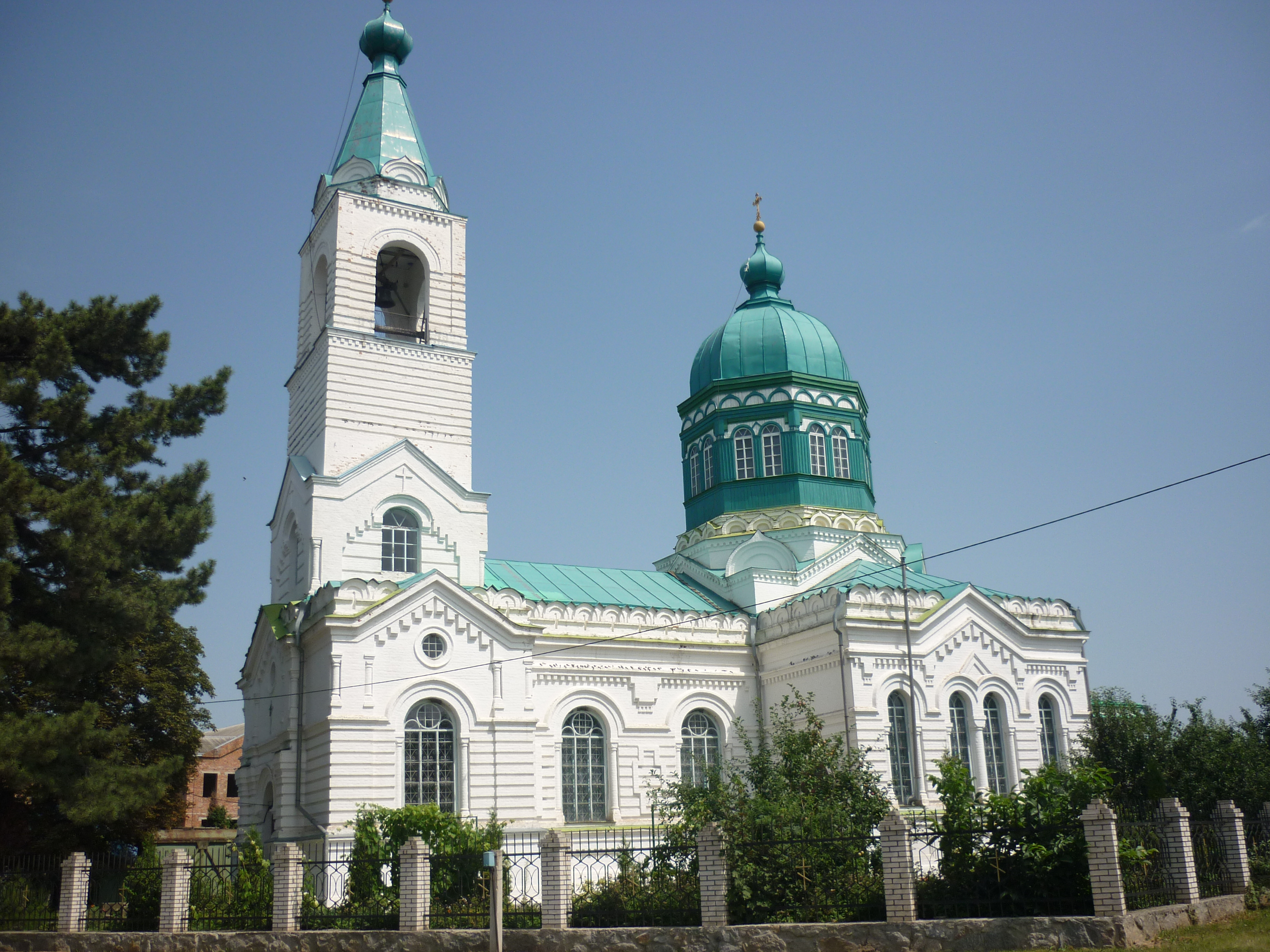 село Родниківка Уманського району: церква